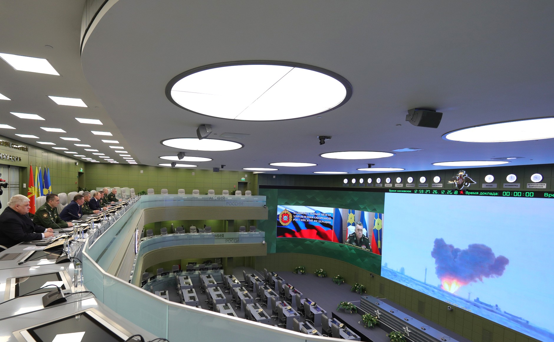 Посещение Национального центра управления обороной (В.В. Путин / 26 декабря 2018)